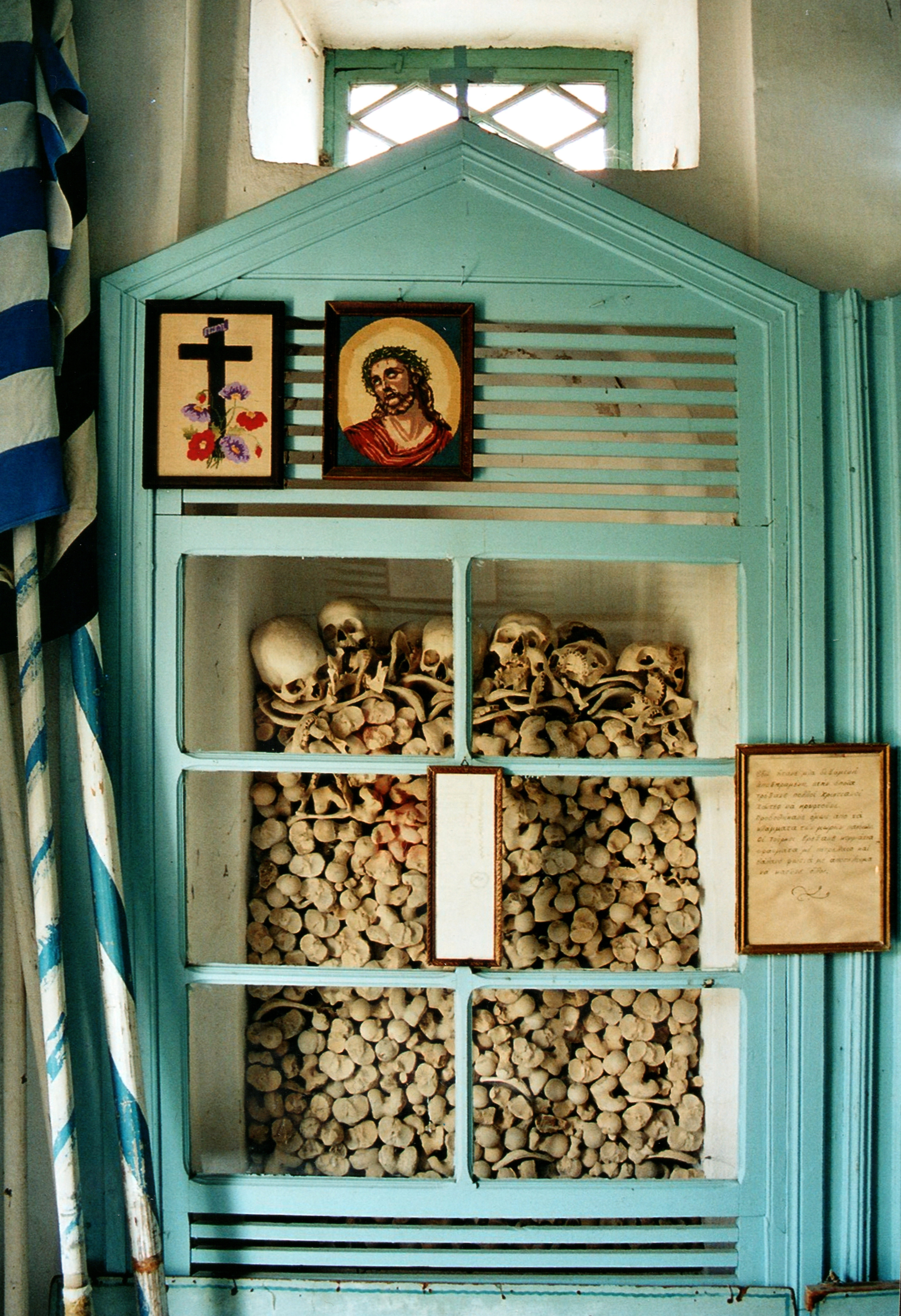 Chios, Kleaster Agios Minos, slachtoffers Turkske moardnerij op Chios 1822